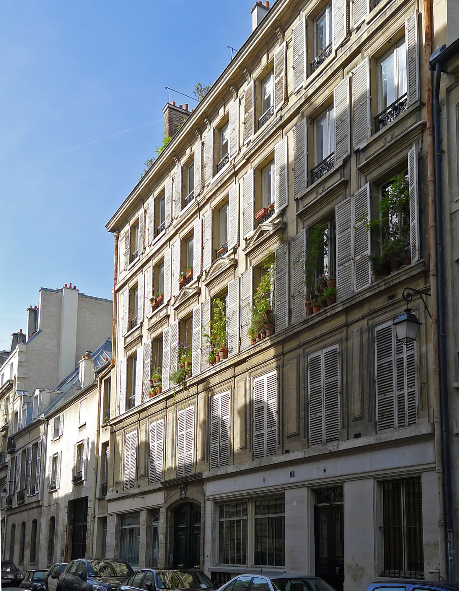 Hôtel de Vitry (ancien) (Inscrit) - n°14 et 14bis rue des Minimes - Paris III .